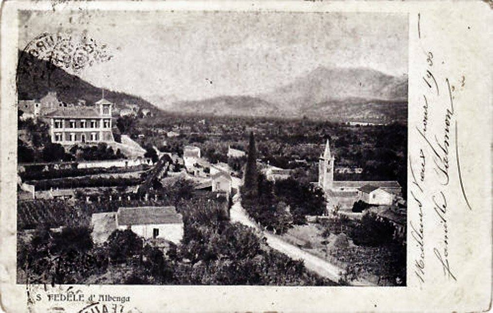 Questa cartolina del 1906 rappresenta la Villa Borea Ricci costruita nel XIX secolo nella frazione di San Fedele di Albenga, nel suo stato originario prima degli ampliamenti.